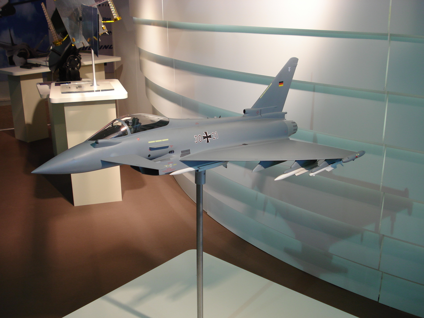 IDEF '07 Savunma Fuarı'nda çekildi.Eurofighter typhoon maket.23 Mayıs 2007